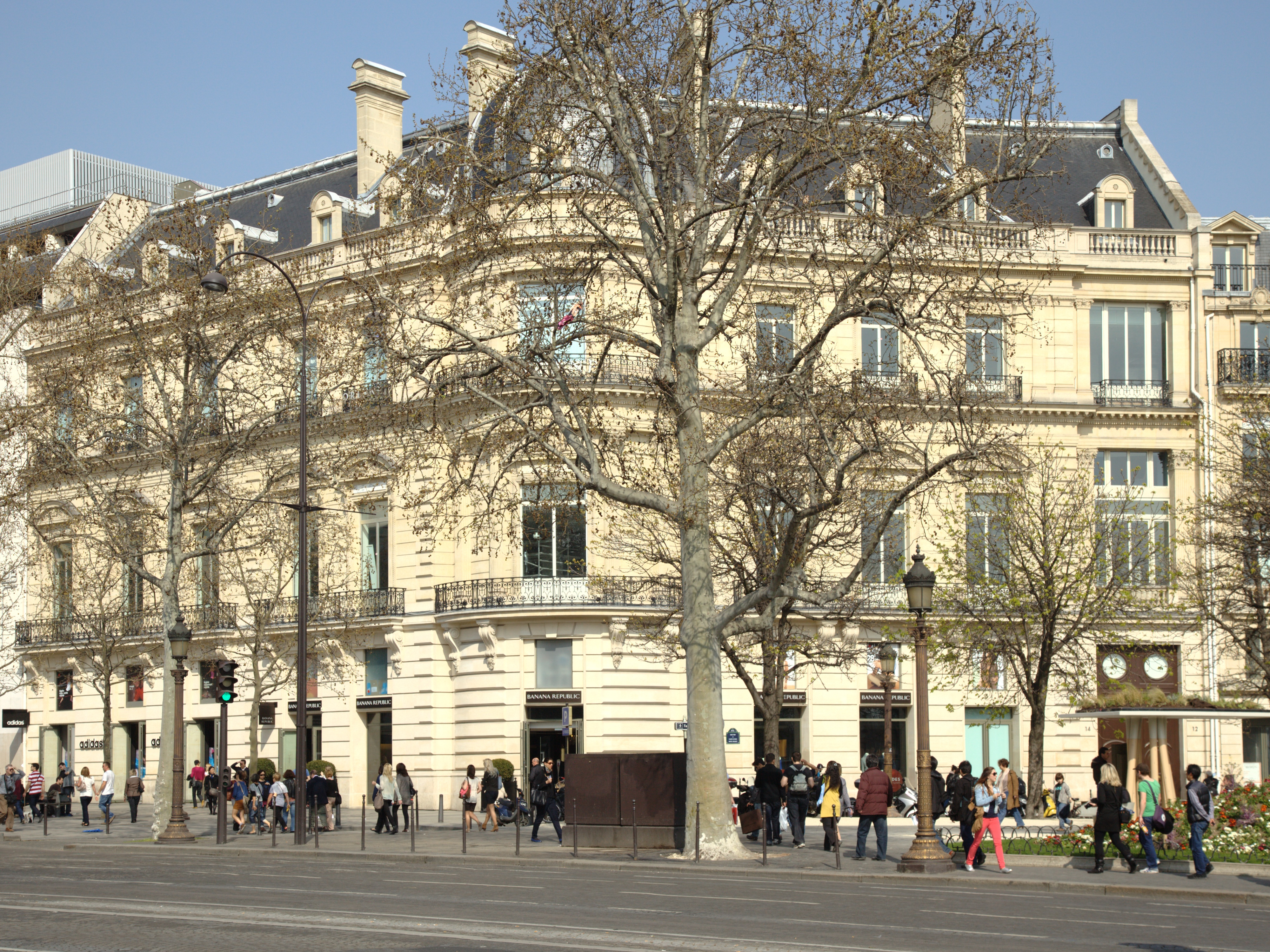 Immeuble au rond point des Champs-Élysées, no 12 et 14